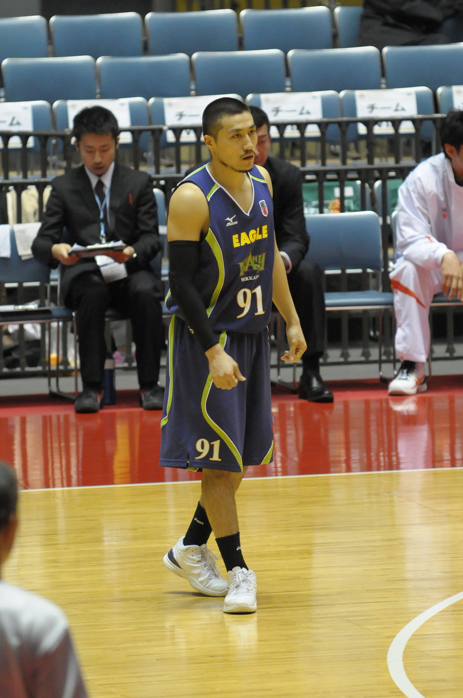 レバンガ北海道、片岡大晴選手。代々木第一体育館で。